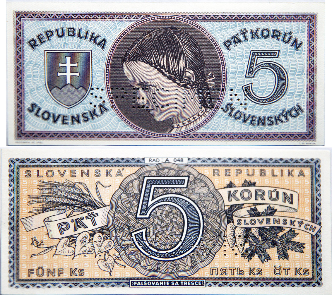 5 korún slovenských z obdobia vojnovej Slovenskej republiky (1939-1945). Averz: v strede v hnedom kruhu hlava dievčaťa zľava, vľavo slovenský štátny znak s kolopisom REPUBLIKA SLOVENSKÁ; vpravo označenie hodnoty číslicou 5 a kolopisom PäŤ KORÚN SLOVENSKÝCH. Reverz: v strede v ornamentálnom kruhu číslica 5, vľavo klasy a na stuhe nápis päť, vpravo ihličnaté vetvičky a na stuhe nápis KORÚN SLOVENSKÝCH. Pri hornom okraji SLOVENSKÁ REPUBLIKA.